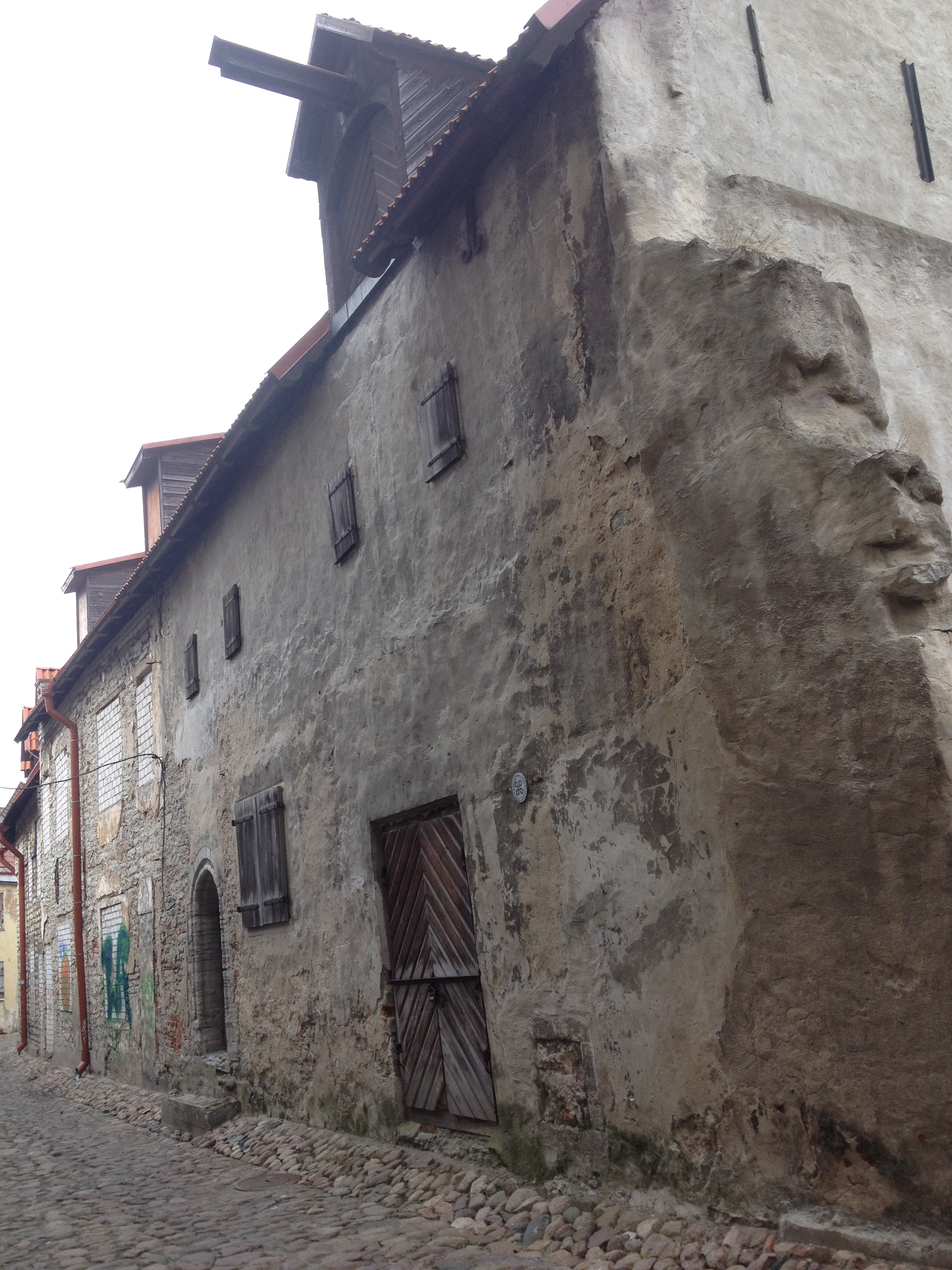 Ait Aida tn6, 15.saj.,1551.a., 1723.a., 1967.a.